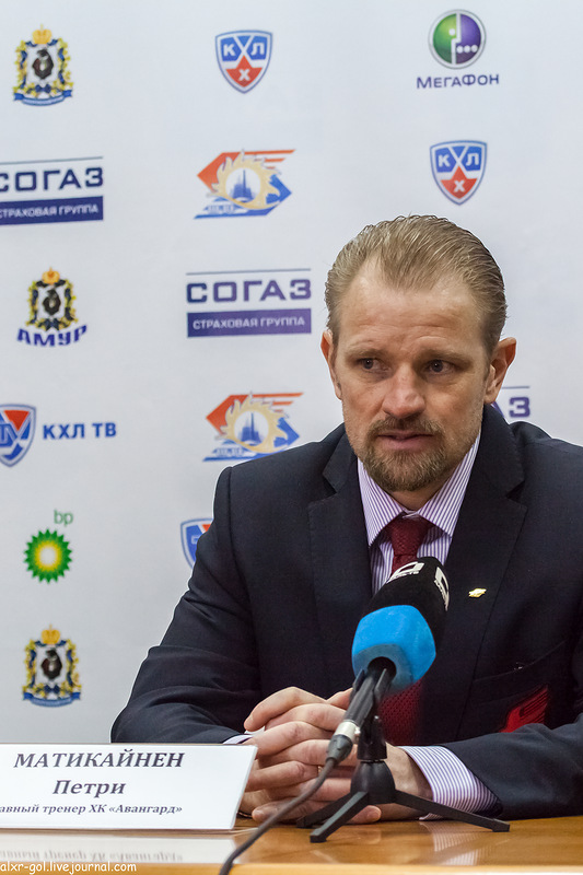 Главный тренер омского Авангарда после игры с Амуром 07.01.13